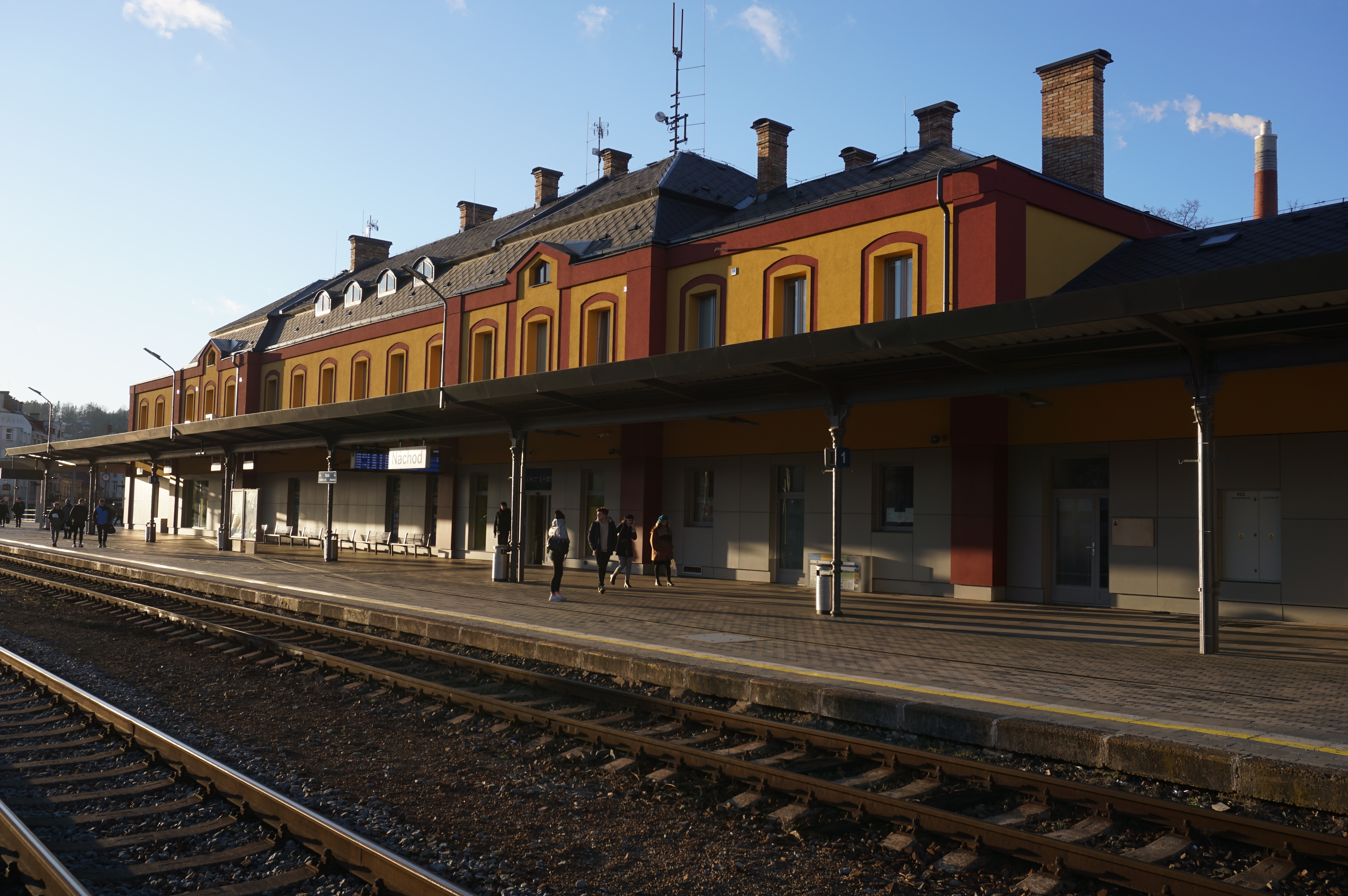 Náchod - železniční stanice (stav v únoru 2020)